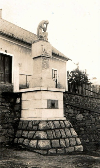 Pomník